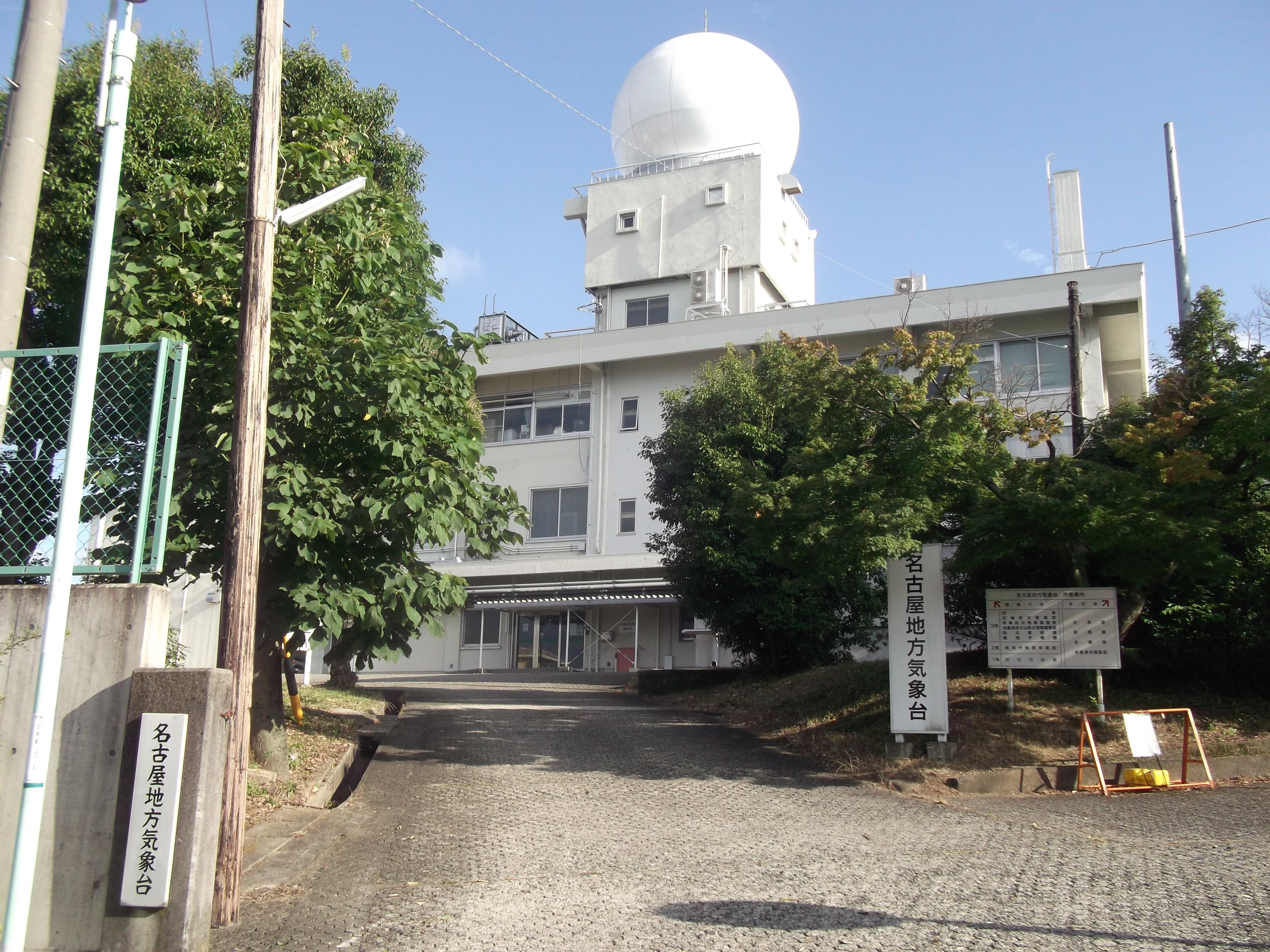 名古屋市千種区日和町の名古屋地方気象台東側の建物を北側公道より撮影